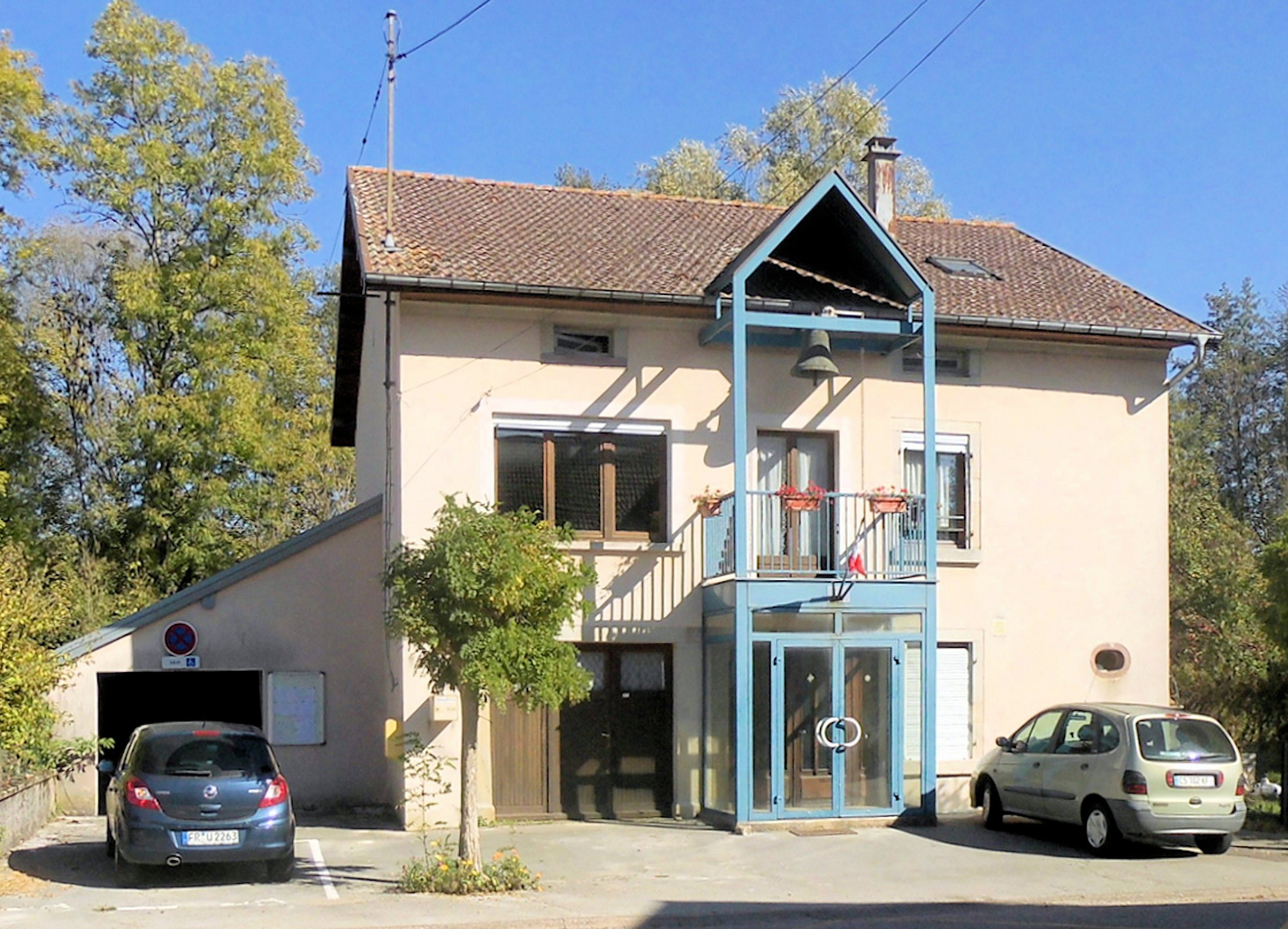 La mairie de La Pisseure